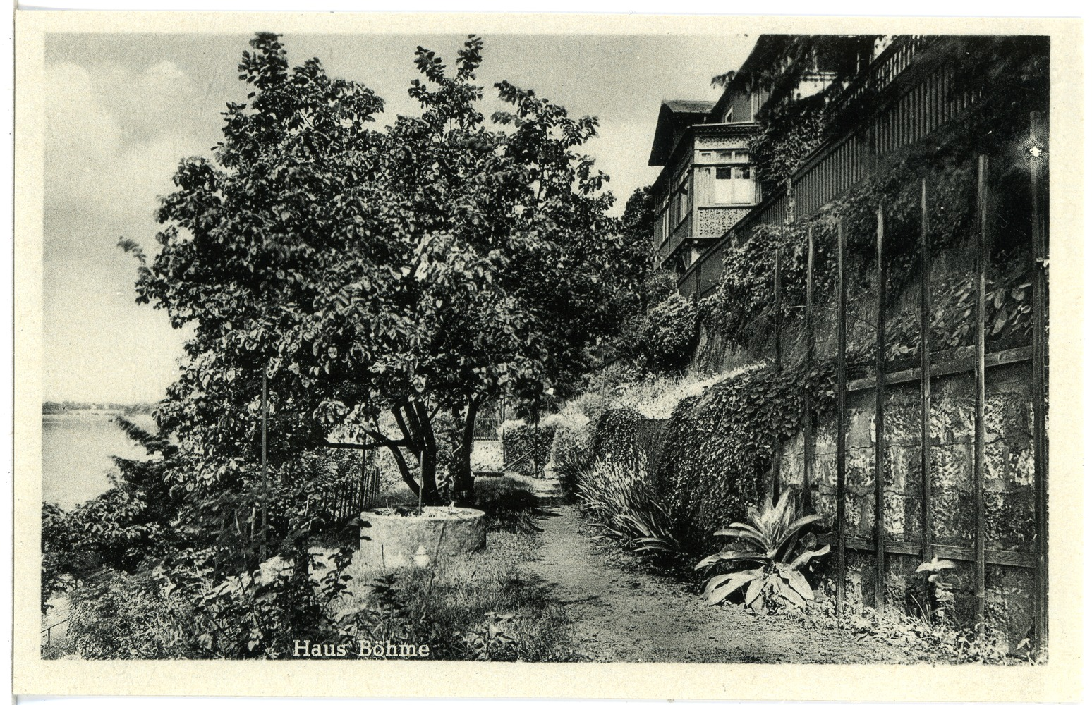 Dresden; Loschwitz, Haus Böhme, Körnerstraße 26 This postcard is from publisher Brück & Sohn in Meißen ( postcard has a unique number 28314 and is available in a higher resolution at the publisher. This images was uploaded in a cooperation project between Wikipedians and the publisher.